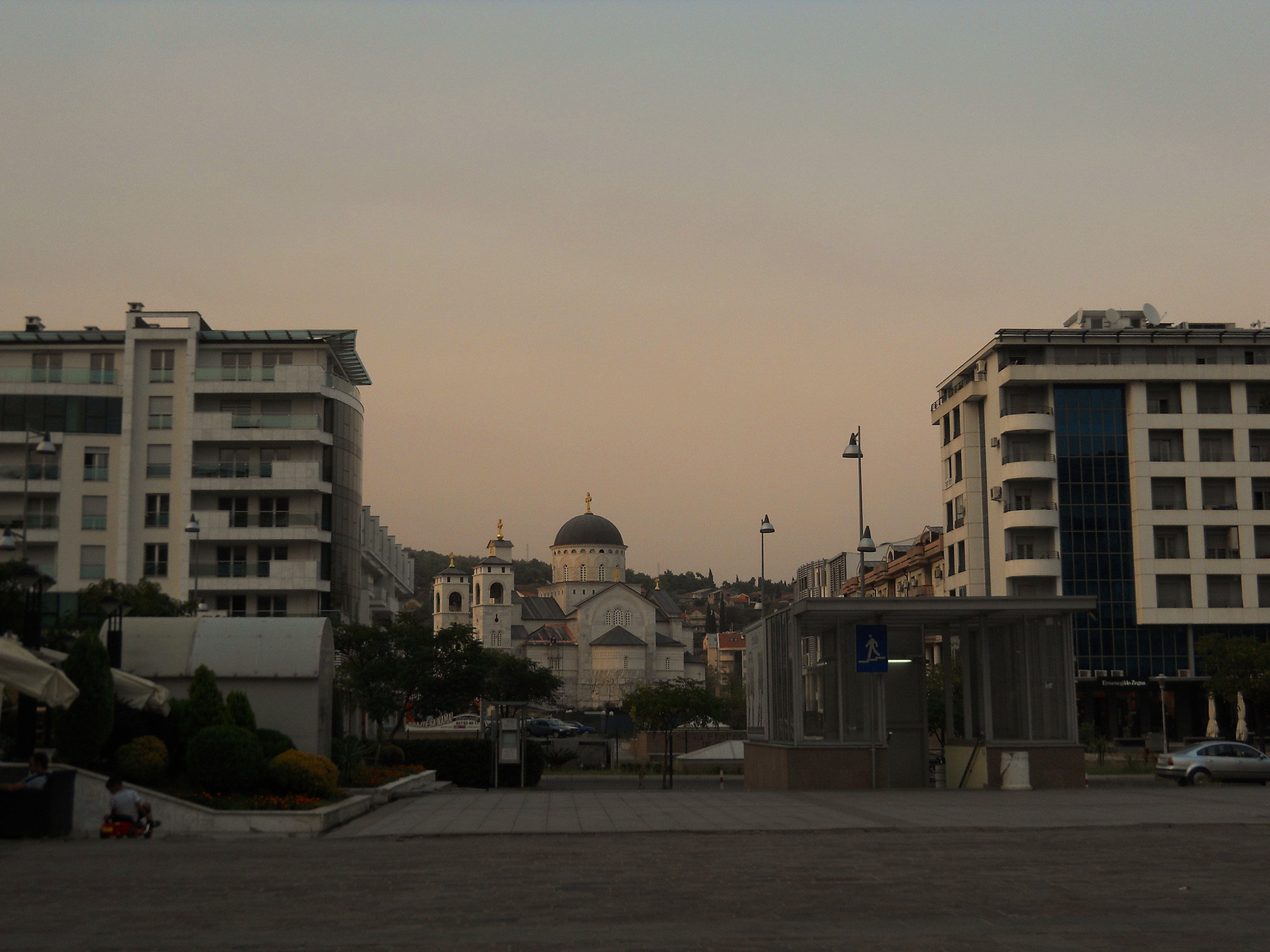 Srpskohrvatski / српскохрватски: Pogled na Hram Hristovog Vaskrsenja